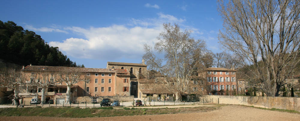 Lumières, Village of Goult, Vaucluse, France